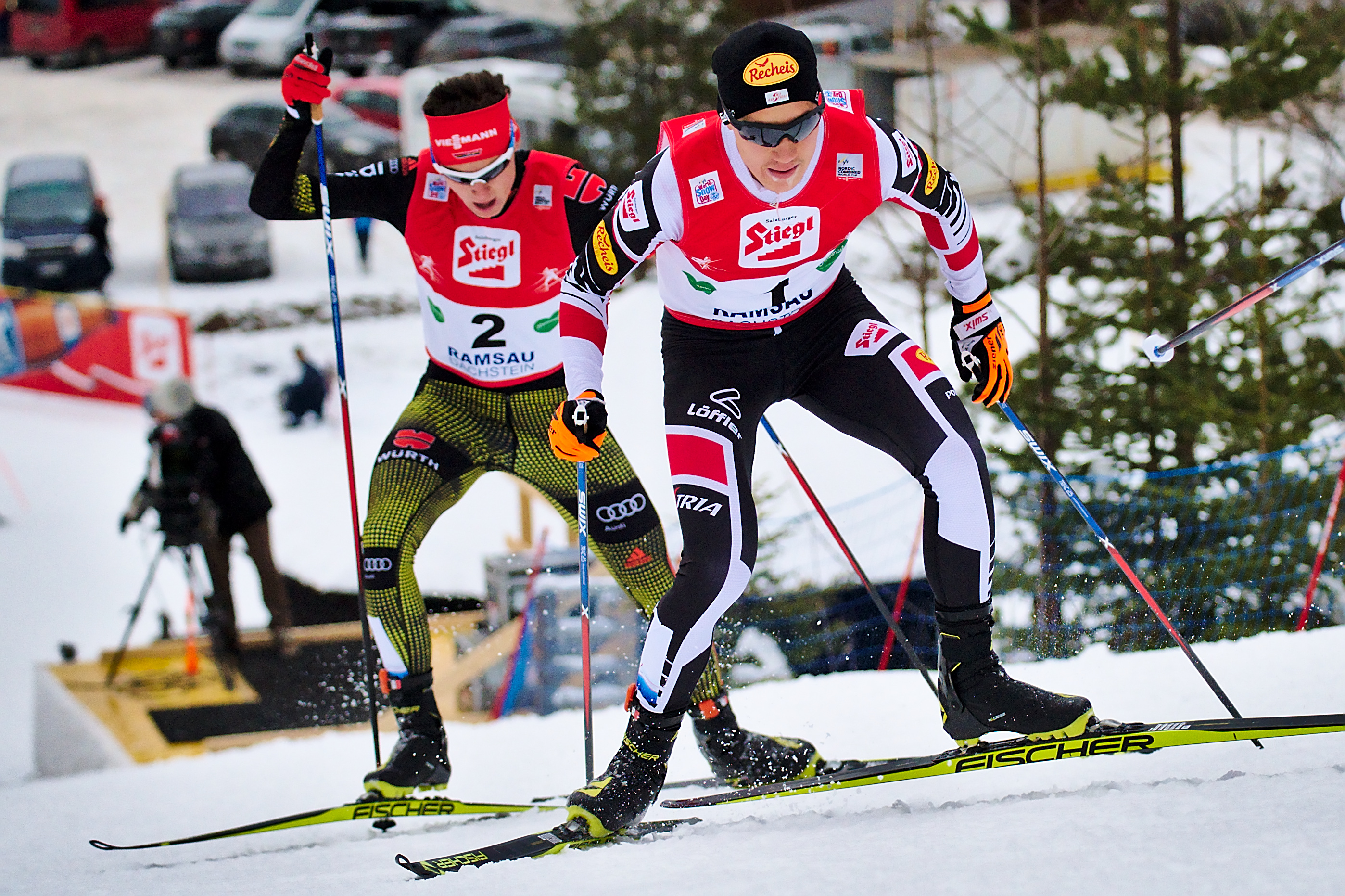 Mario Seidl (AUT)